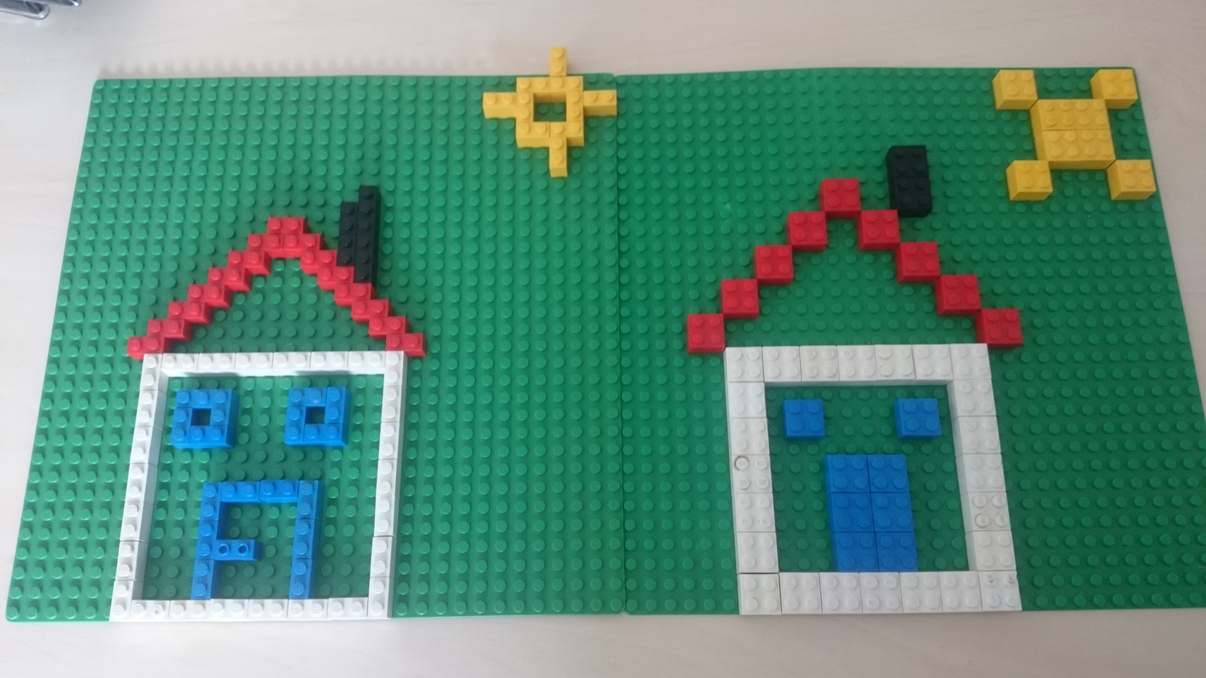 Legohaus große kleine Bausteine